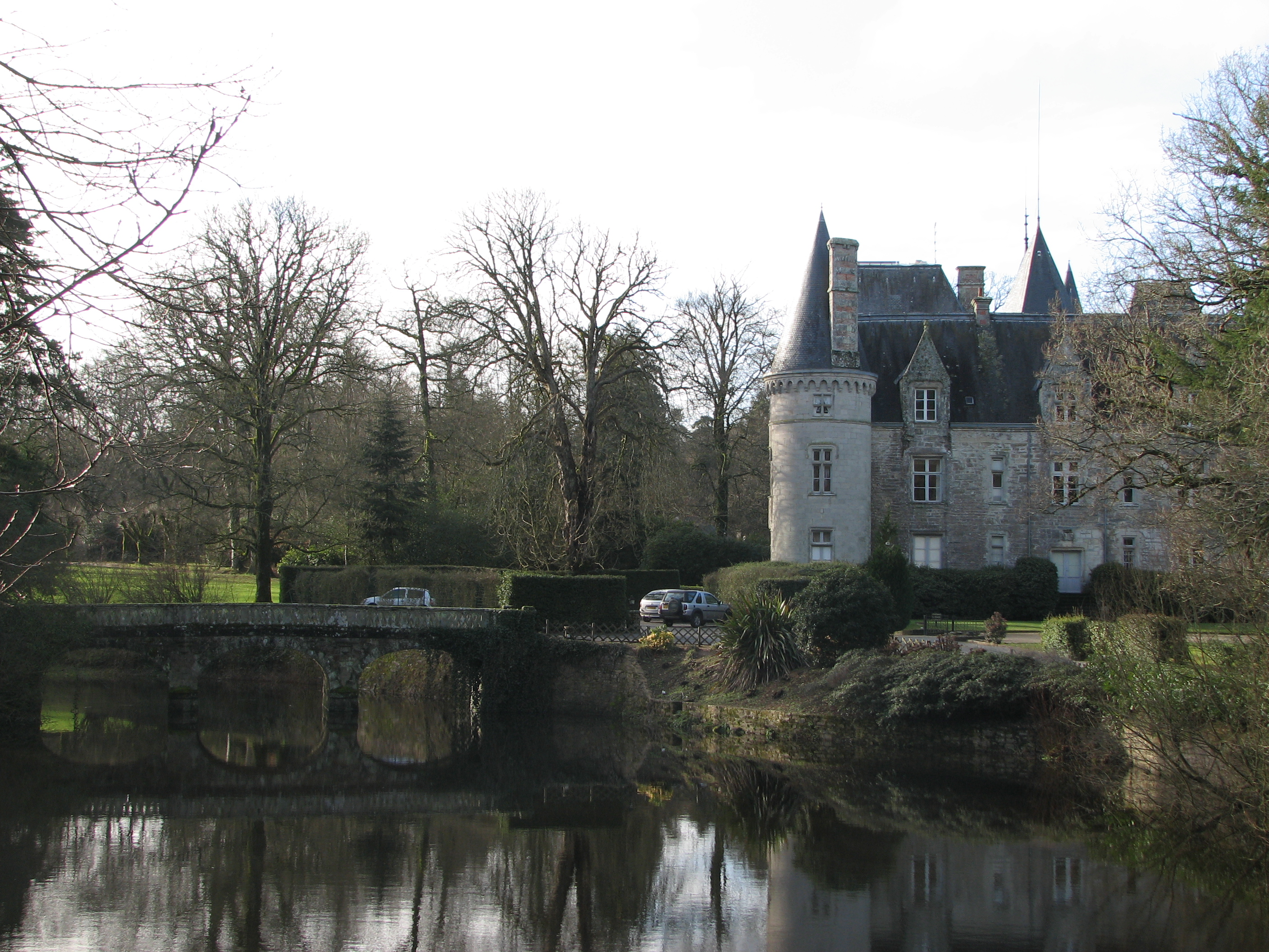 Château de Trédion (Morbihan)